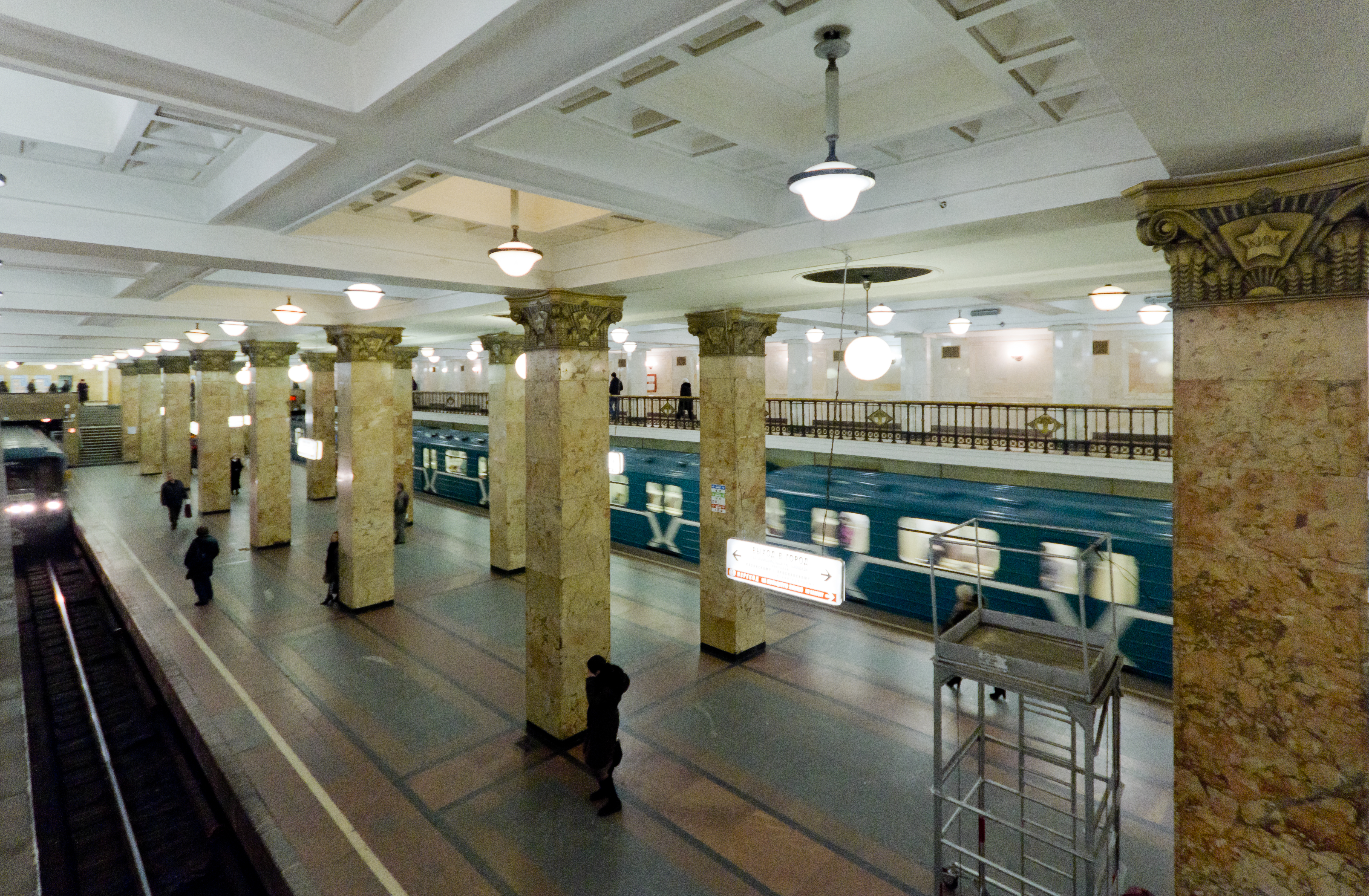 Комсомольская (станция метро, Сокольническая линия)